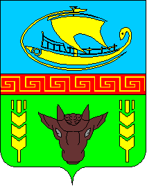 Герб Урзуфа